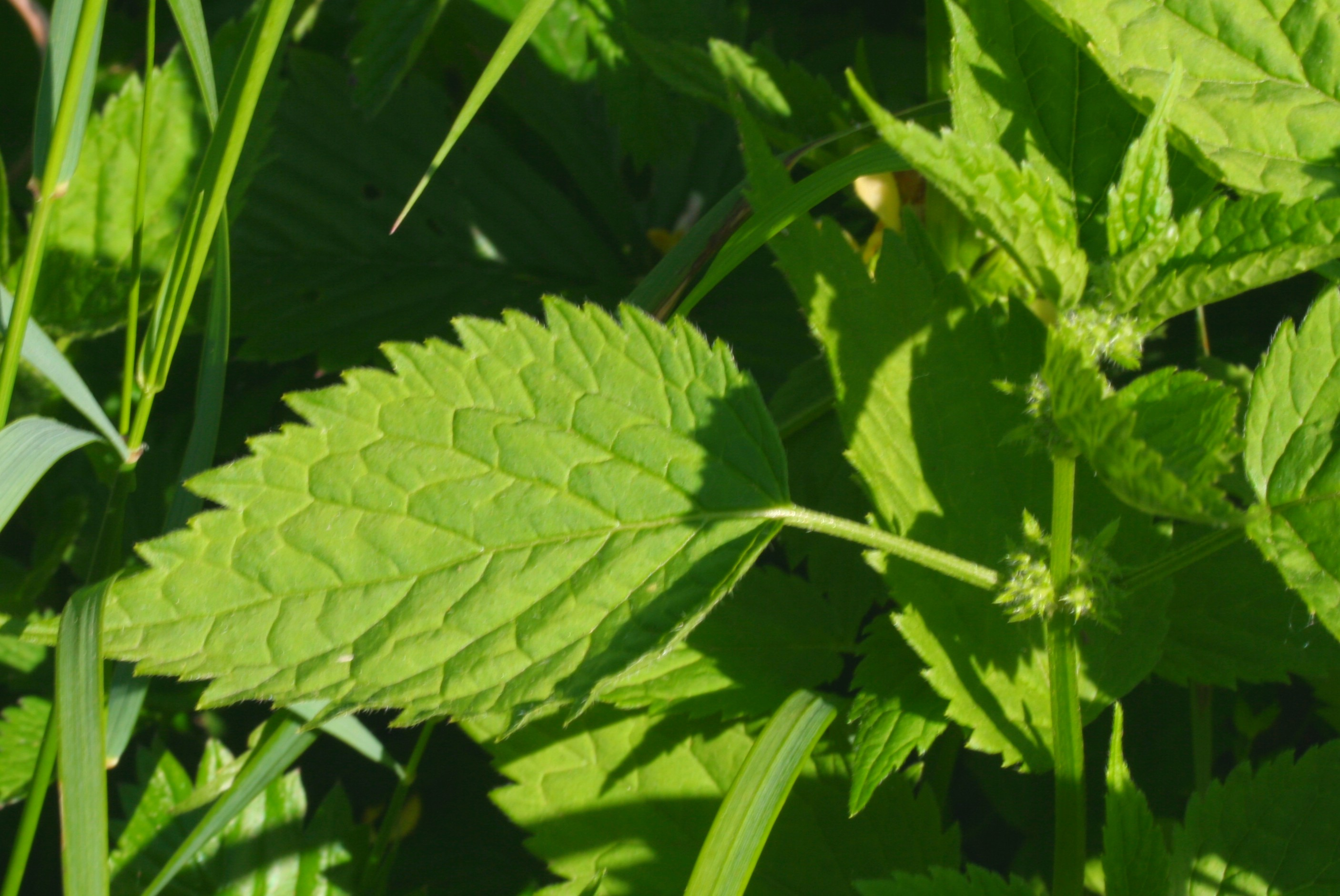 Falsa ortica gialla - Località : Pasa, Sedico (BL), 356 m s.l.m.